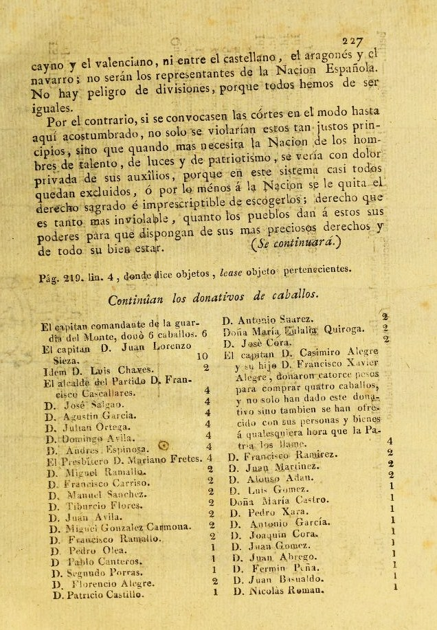 donativos de caballos, publicados por La Gazeta de Buenos Aires el 6 de septiembre de 1810